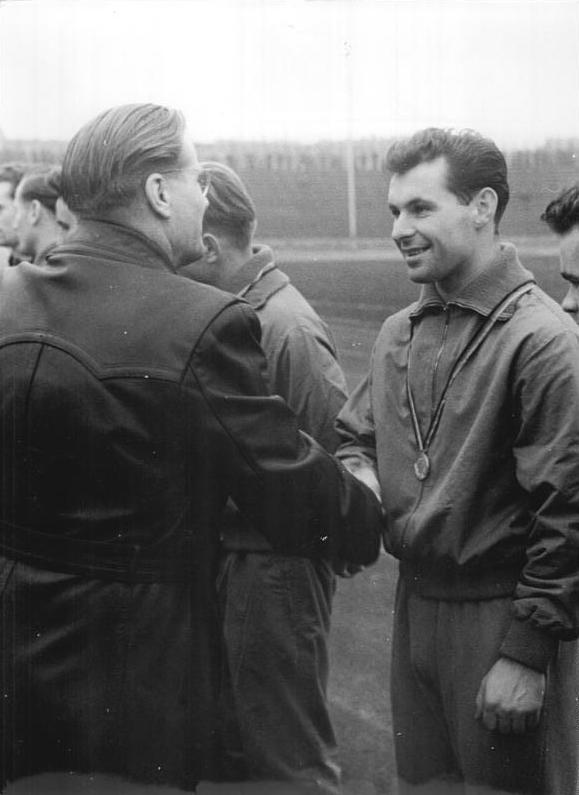 Zentralbild-Wendorf-Zastrow Wen-Uh 23.11.58 ASK Vorwärts siegte auch über Wismut - Im Jahn-Stadion Berlin konnte der ASK-Vorwärts auch dem SC Wismut Karl-Marx-Stadt am 23.11.58 mit 2:0 Toren das Nachsehen geben. Vor dem Spiel fand durch Dr. H. Schuster (Staatliches Komitee) die Auszeichnung des neuen Deutschen Fußballmeisters statt. UBz.: Der Präsident des DFV Kurt Stoph gratuliert dem Vorwärts-Spieler Unger.